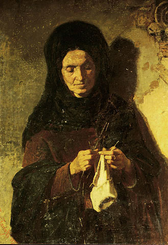 Lady knitting